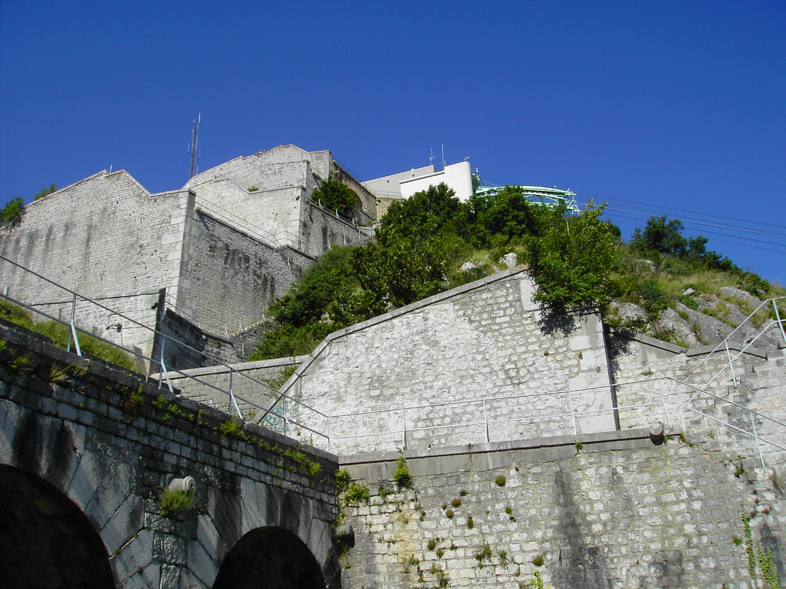 Fortifications de la Bastille - Grenoble, France